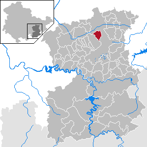 Kospoda in Thuringia - Saale-Orla-Kreis